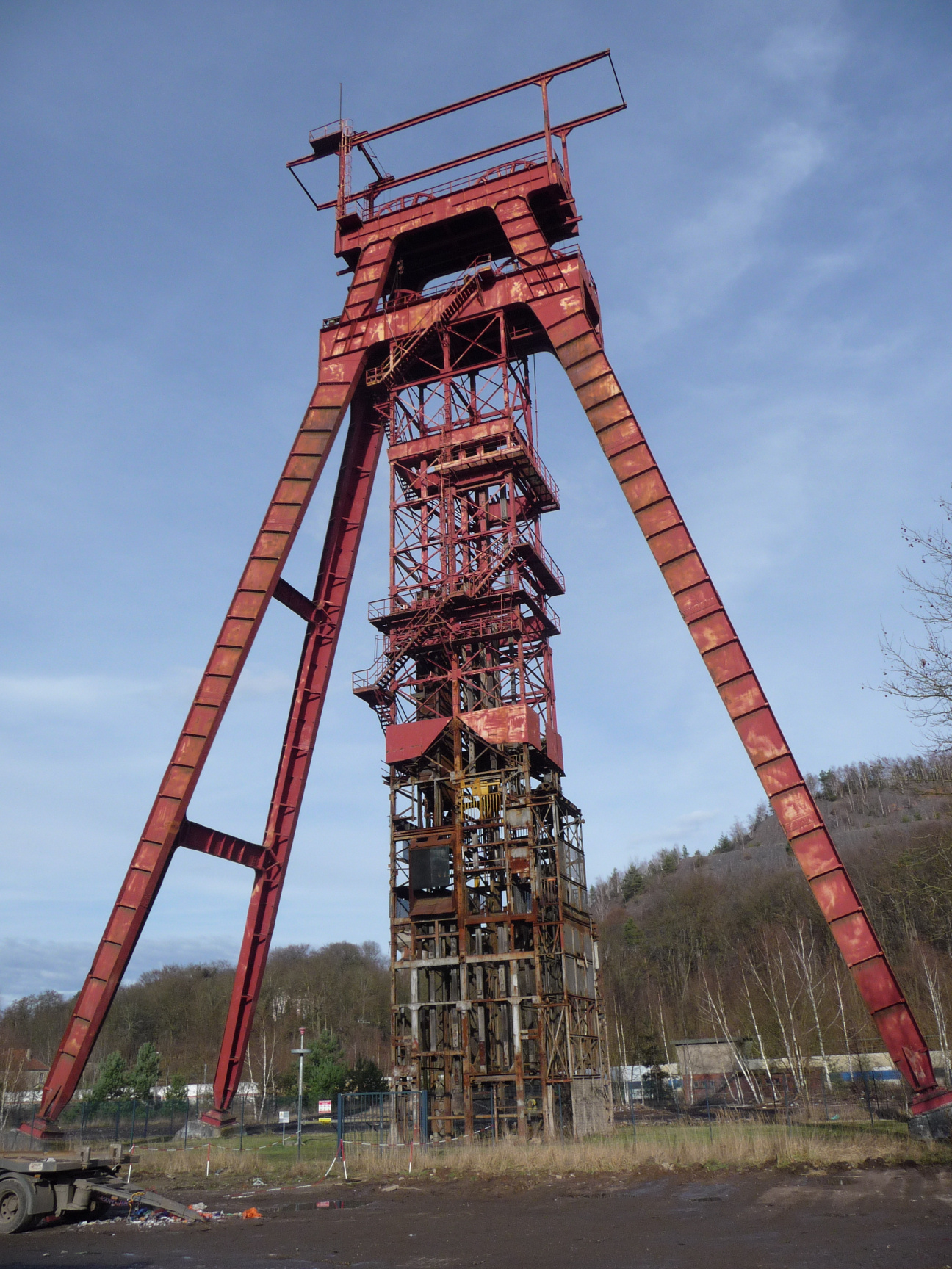 Fördergerüst Sainte Fontaine